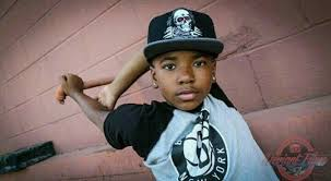 Kiswahili: Kida akiwa mtoto